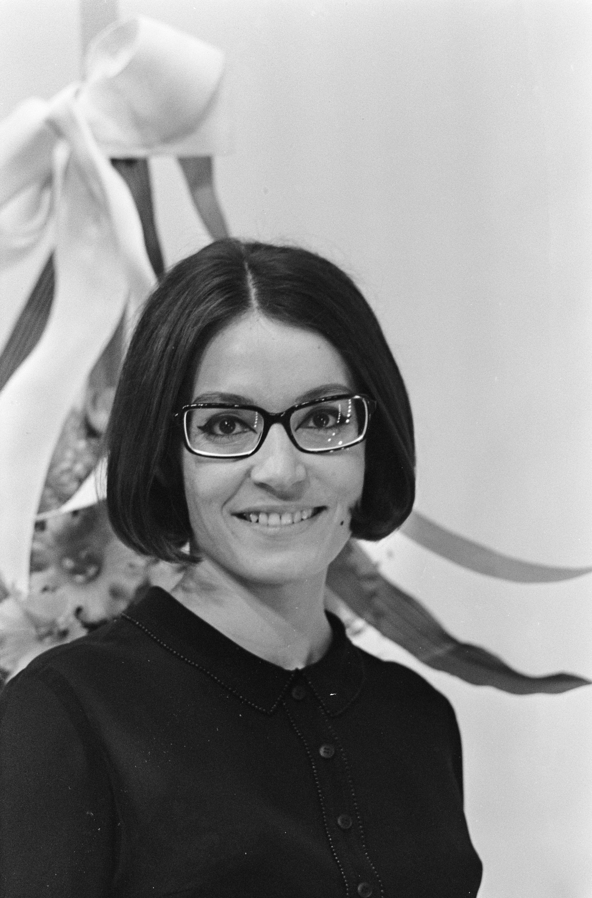 Collectie / Archief : Fotocollectie Anefo Reportage / Serie : [ onbekend ] Beschrijving : Caterina Valente show , Nana Mouskouri (kop) Datum : 3 juni 1966 Persoonsnaam : Mouskouri, Nana Fotograaf : Kroon, Ron / Anefo Auteursrechthebbende : Nationaal Archief Materiaalsoort : Negatief (zwart/wit) Nummer archiefinventaris : bekijk toegang 2.24.01.05 Bestanddeelnummer : 919-2234